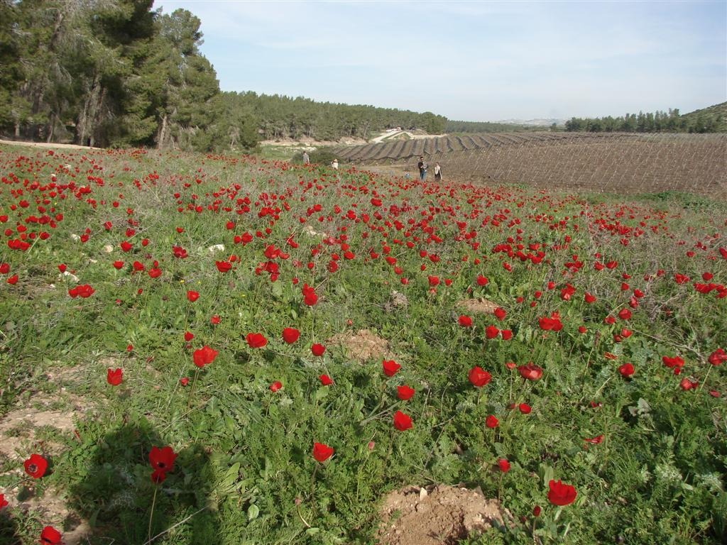 כלניות בנחל אדוריים